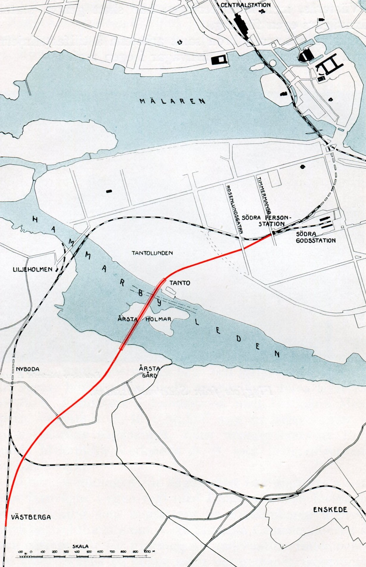 Årstaviken och Hammarbyleden med sträckning av Årstabron